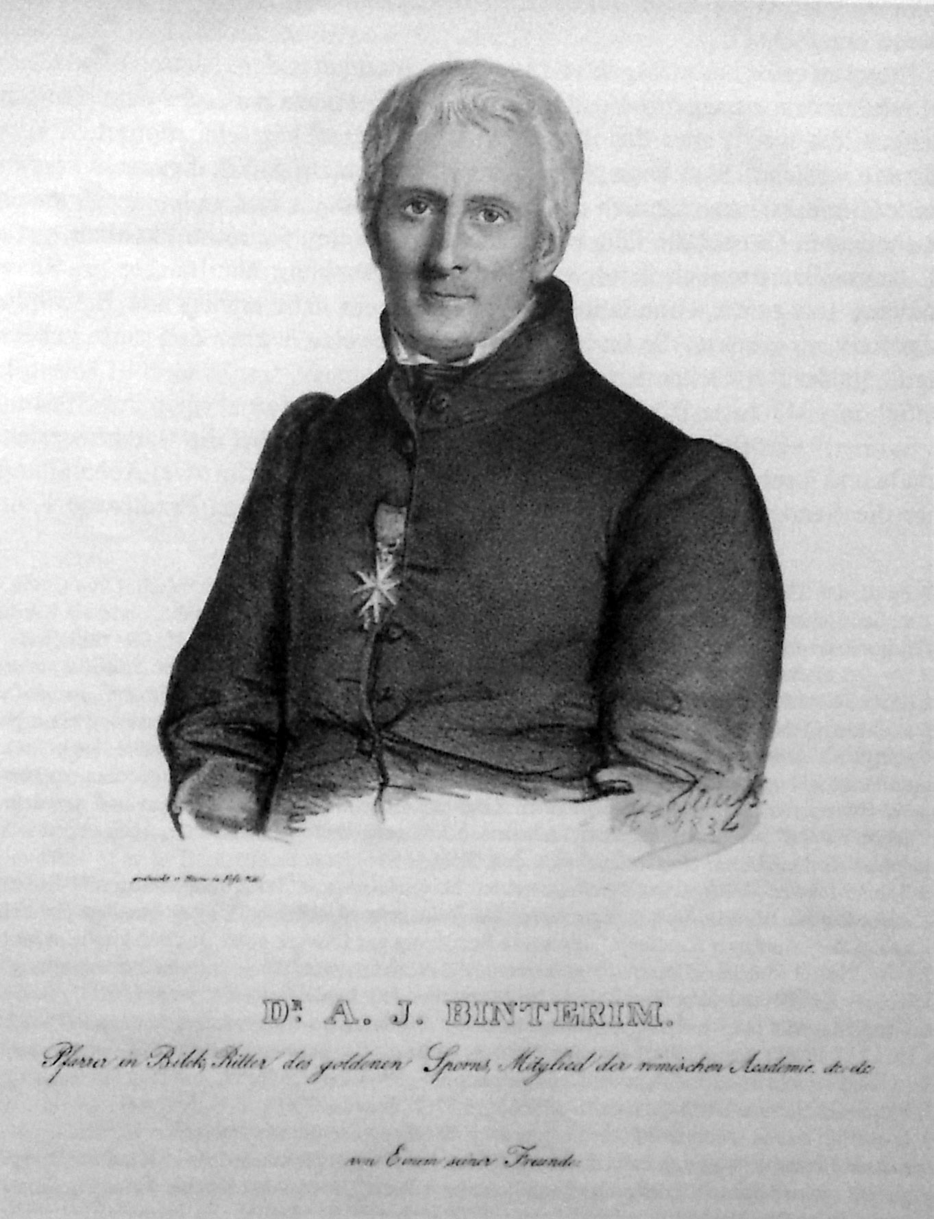 Anton Josef Binterim - Gemälde aus dem Jahre 1834